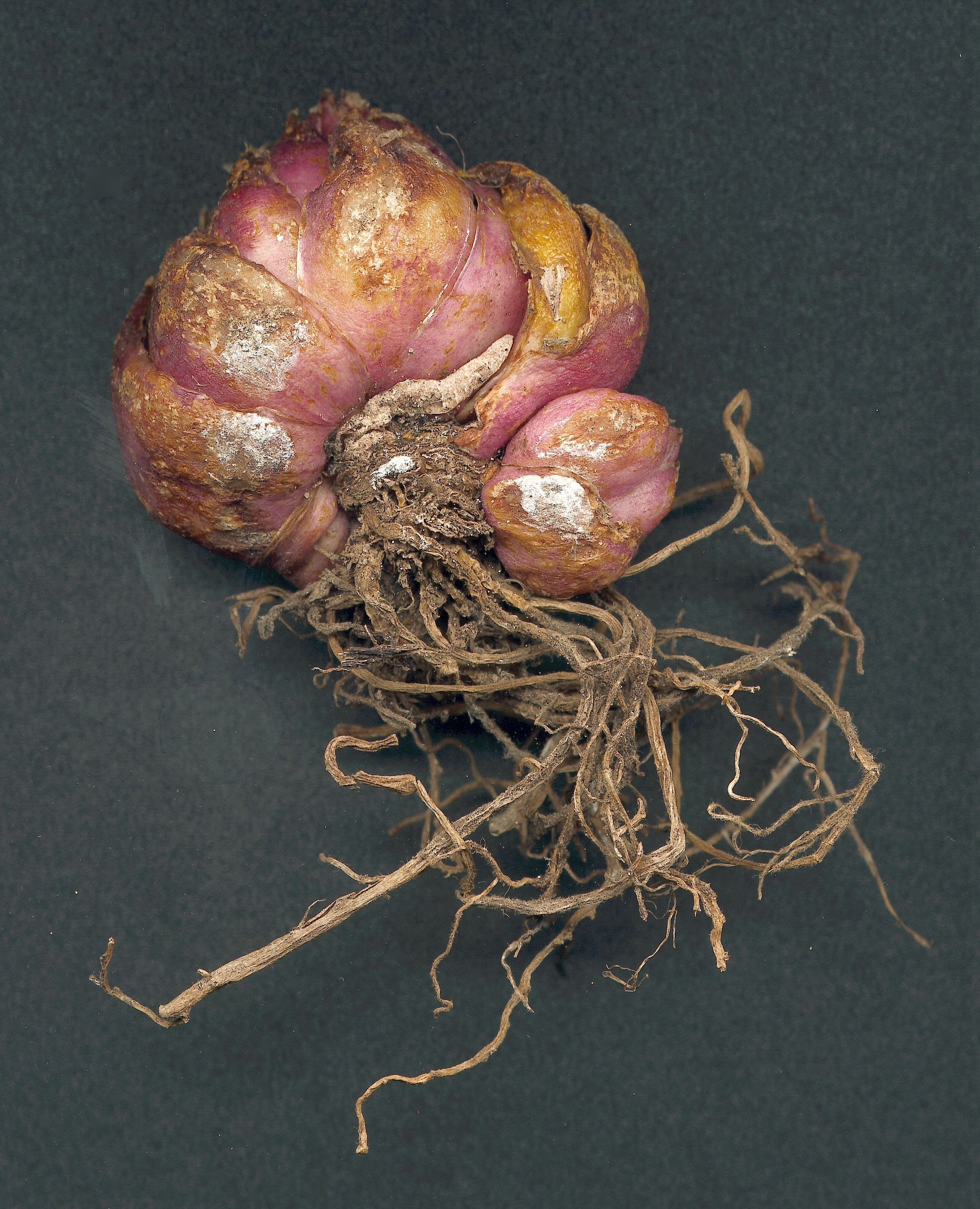 Lilium speciosum var. rubrum Bulbus